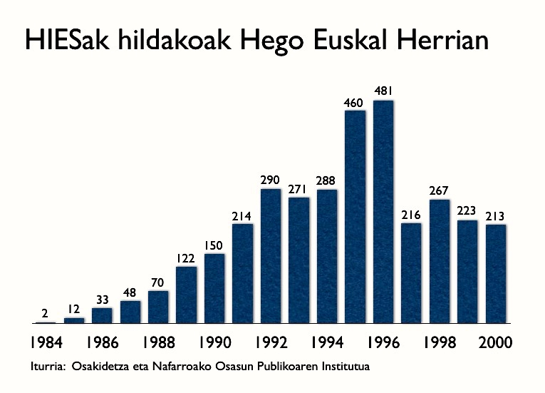 This graphic shows the amount of people dead by Aids in Southern Basque Country, during the period 1984-2000